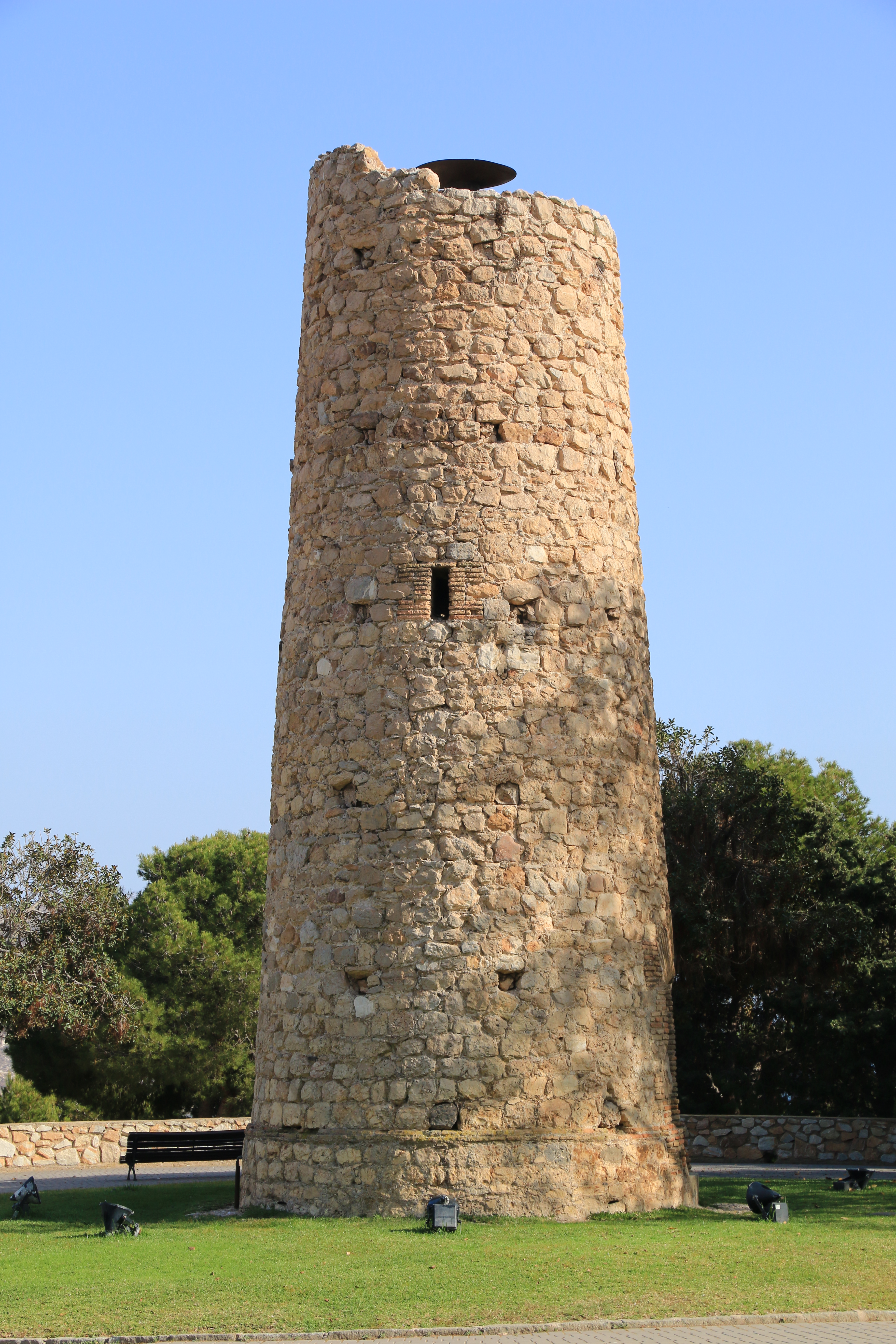 Ruin in Cartagena on the top.